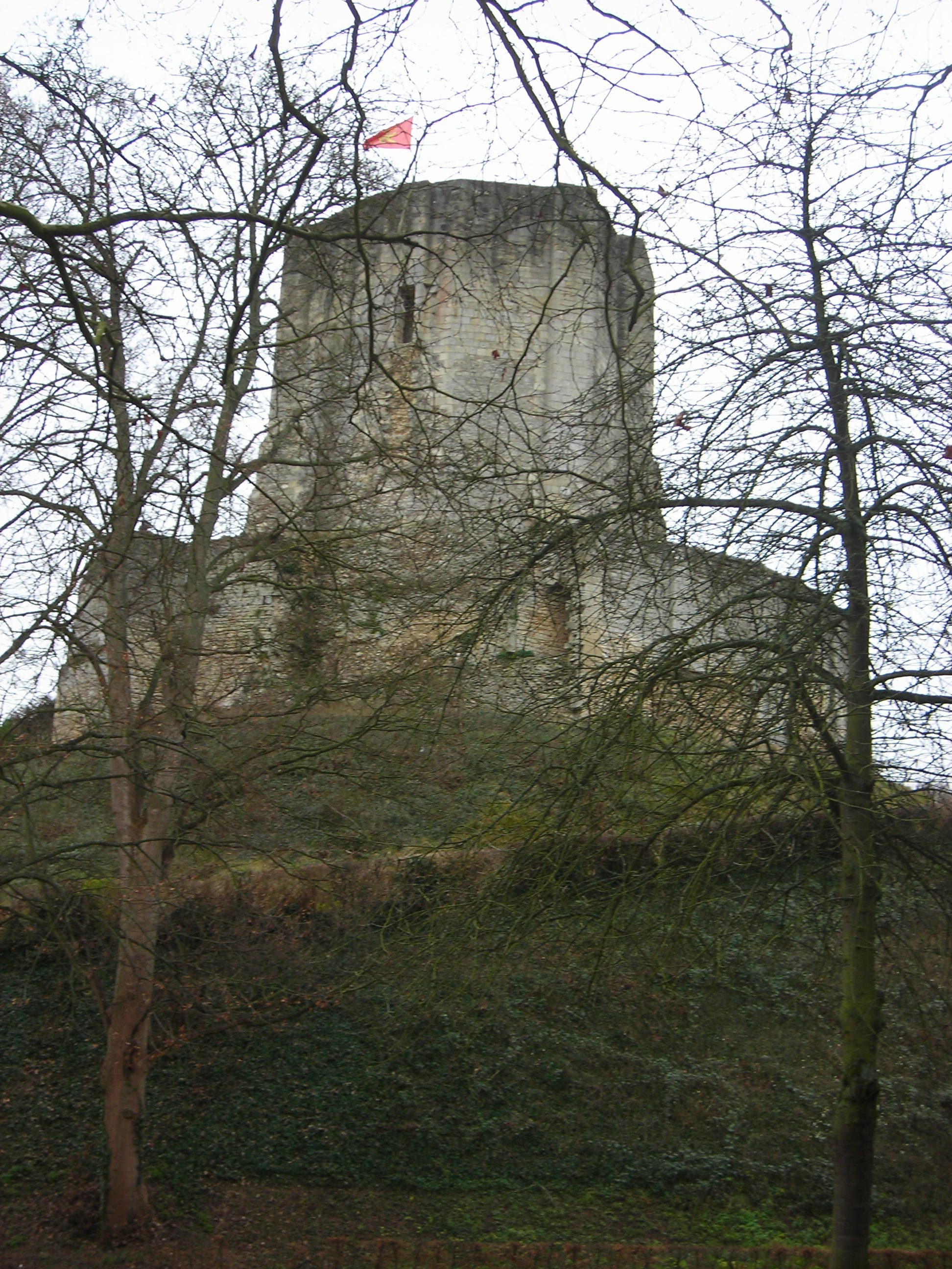 Tour du chateau de Gisors, Normandie